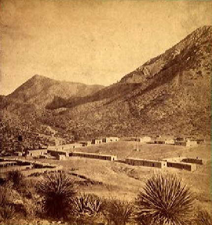 Fort Bowie, circa 1880.